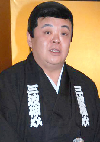 三波伸介の生前のイメージ